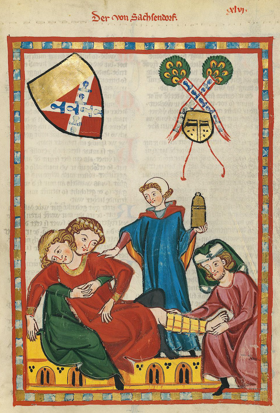 Codex Manesse, UB Heidelberg, Cod. Pal. germ. 848, fol. 158r: Der von Sachsendorf